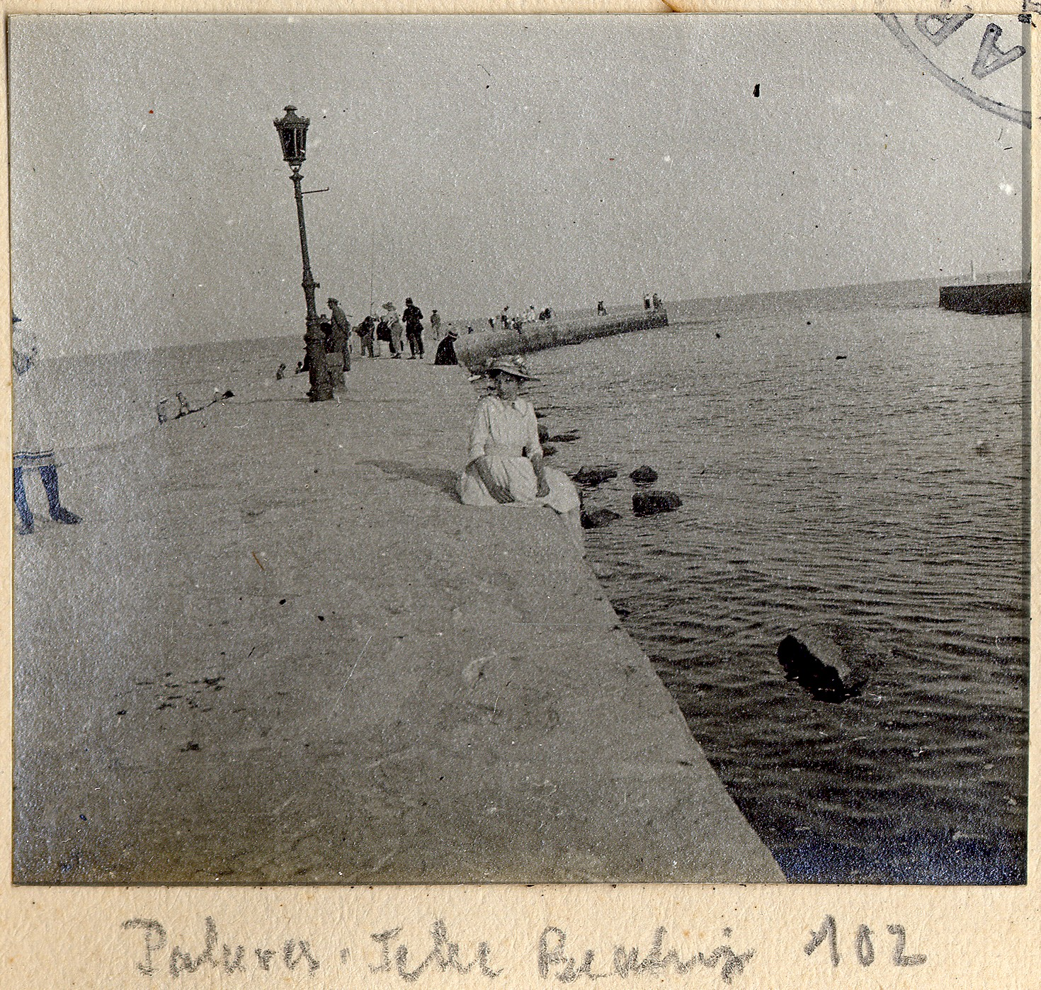 Portrait de Beatrix Berthelée (la petite soeur de Raoul) assise sur une jetée à Palavas-les-Flots (Hérault). Mai-juin 1915. Guerre 1914-1918.